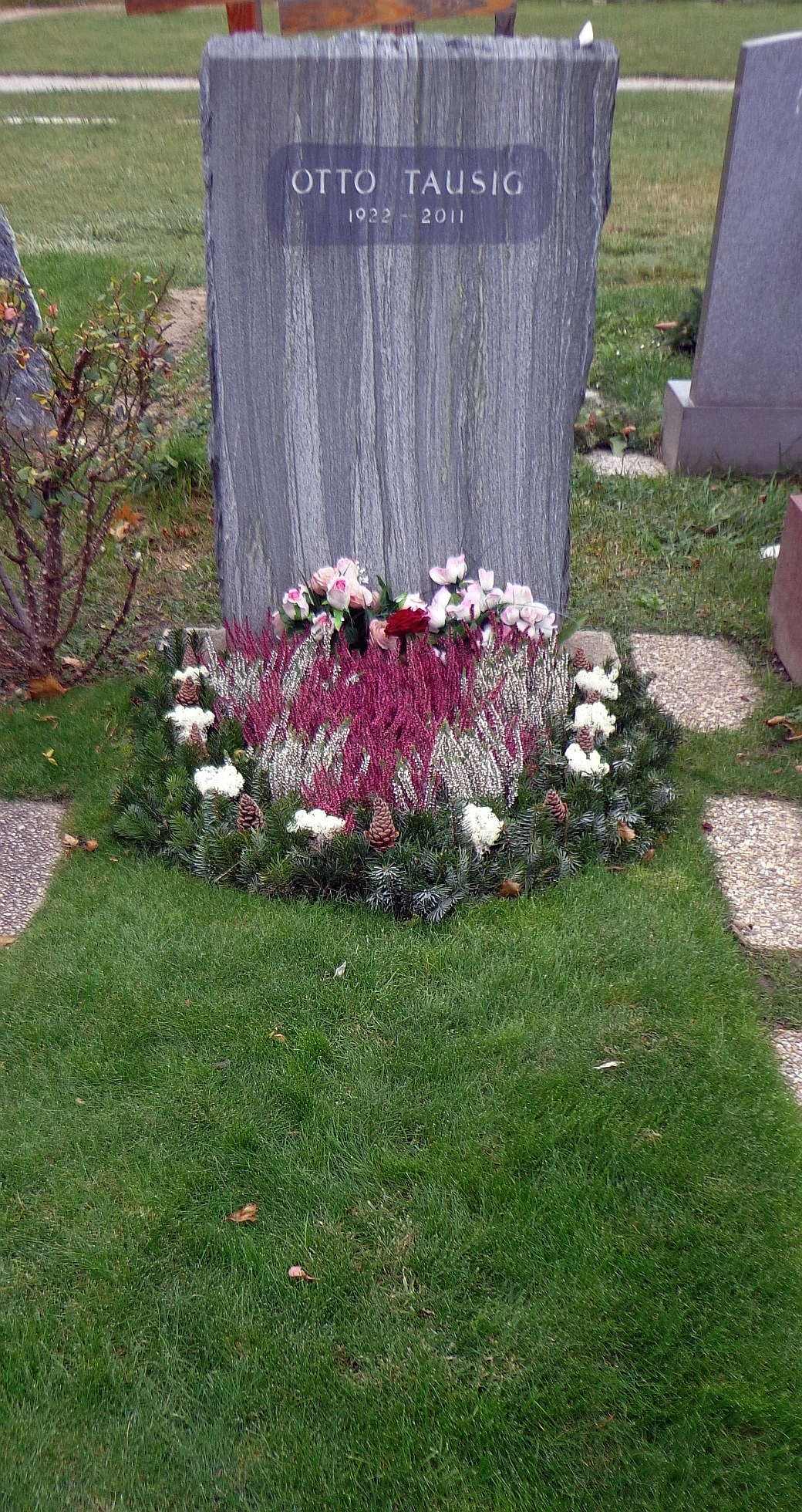 Wiener Zentralfriedhof - Gruppe 40: ehrenhalber gewidmetes Grab von Otto Tausig